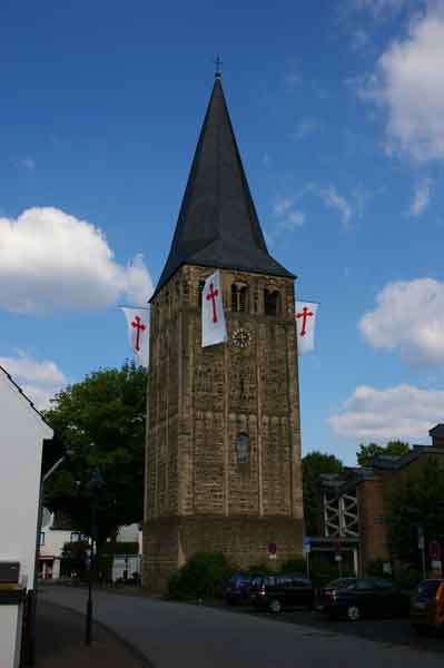 Sankt Martinus in Richrath